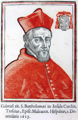 Cardenal Gabriel Trejo Paniagua